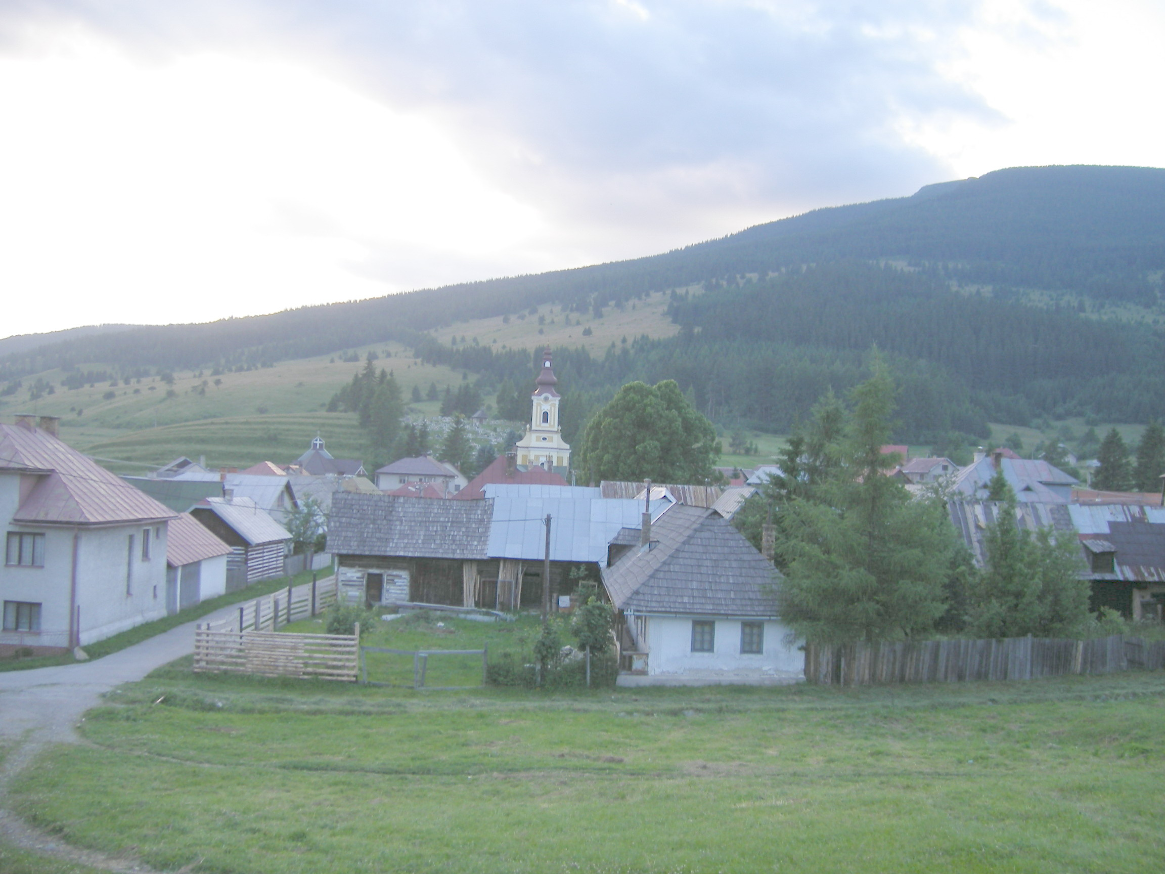 Telgárt (okres Brezno)